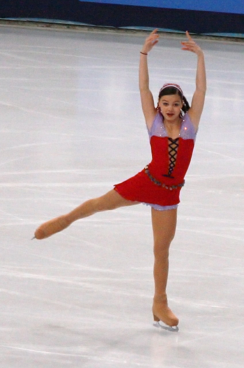 Лена Маррокко на 2011 Trophée Eric Bompard